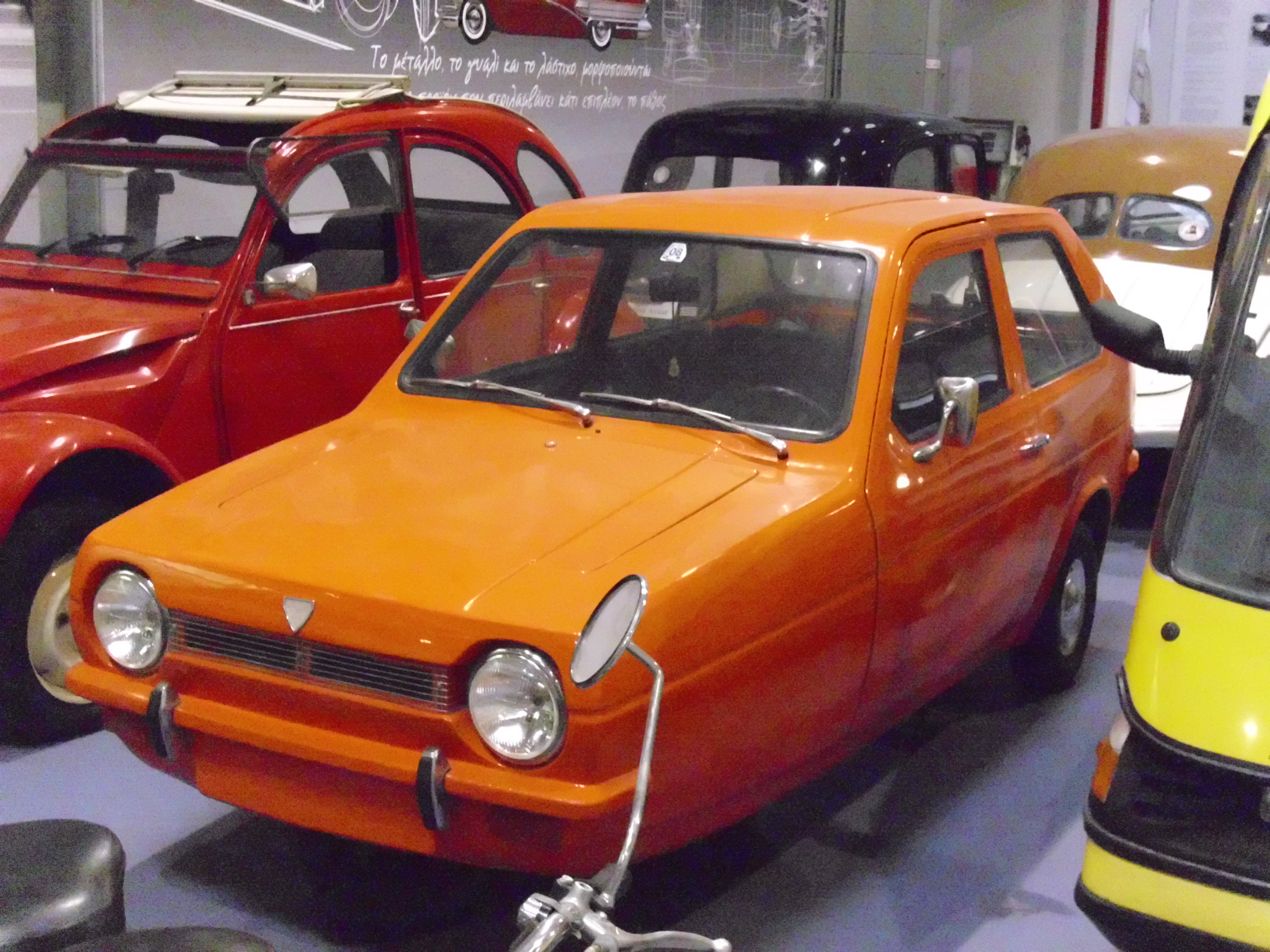 MEBEA Robin Dreirad von 1974–1978 im Noesis-Technikmuseum in Thessaloniki.